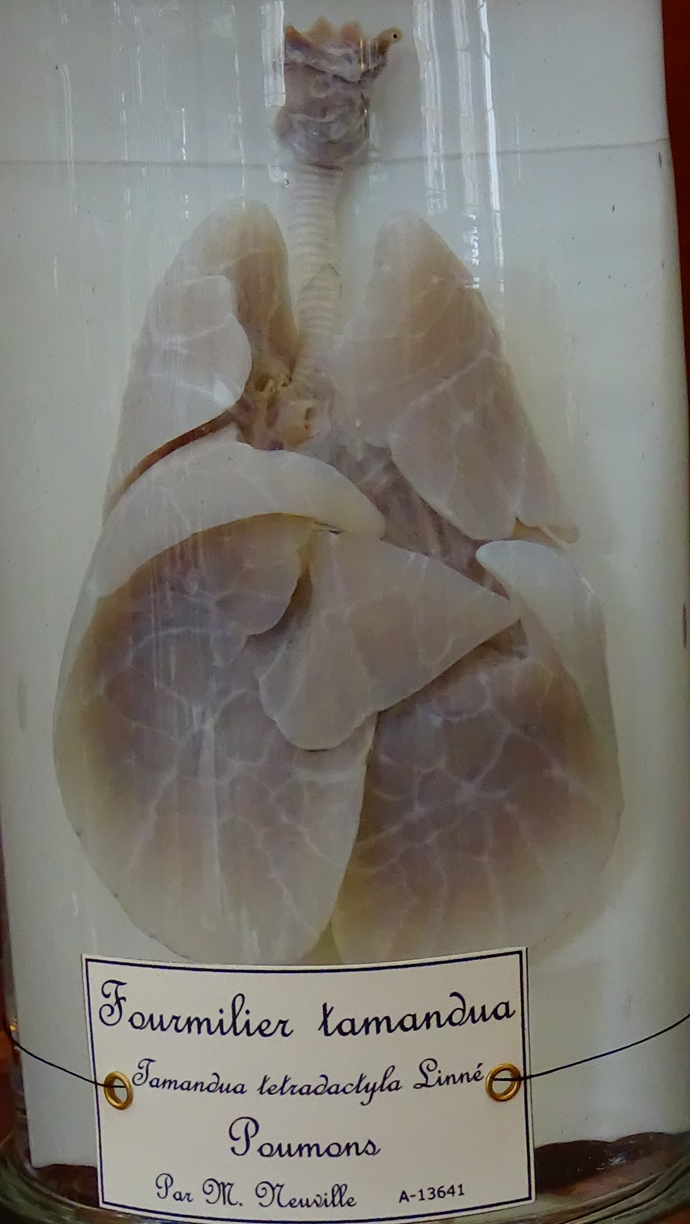 Tamandua tetradactyla - Fourmiliers Tamandua - Poumons mnhn Paris